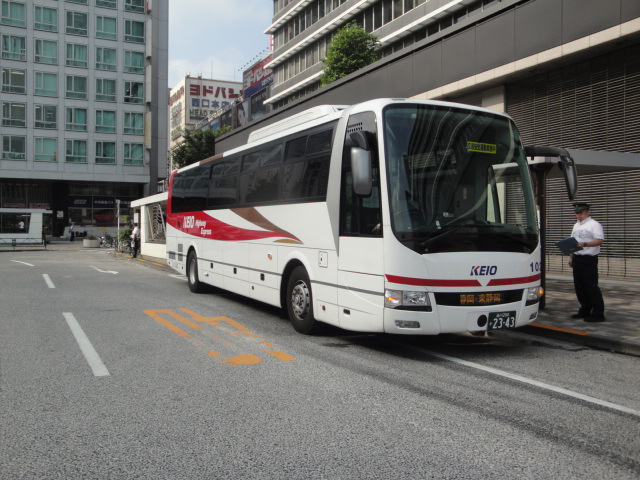 新宿駅西口発車前